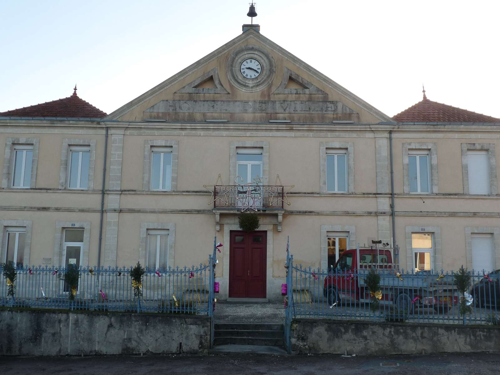 mairie de Montlieu-la-Garde, Charente-Maritime, France